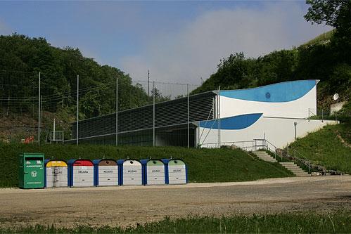 Sportanlage von Liesberg